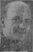 Arkitekten Zander Säfverstam